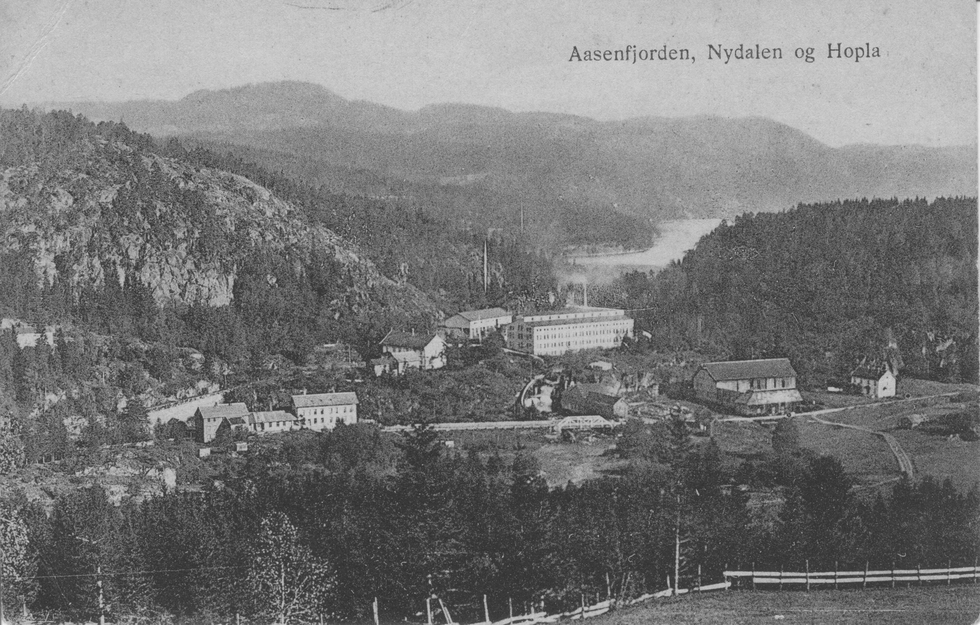 Hopla og Nydalen i Åsen sett fra Berg. Midt i bildet den nye fabrikkbygningen på De forenede ullvarefabrikker (Nydalens fabrikker), oppført ca. 1915. Helt til høyre er gårdstunet i Hopla (227-1). Til venstre for fabrikken er Hovedlåna (Nydalen II, 227-51). På skrå ned for denne er butikken (Hopla vestre, 227-28), og til venstre for denne er arbeiderboligen Pikehjemmet. Fotograf: Ukjent Fotoeier: Åsen Museum og Historielag Digitalisering: Arne Langås Foto-ID: 001-0298